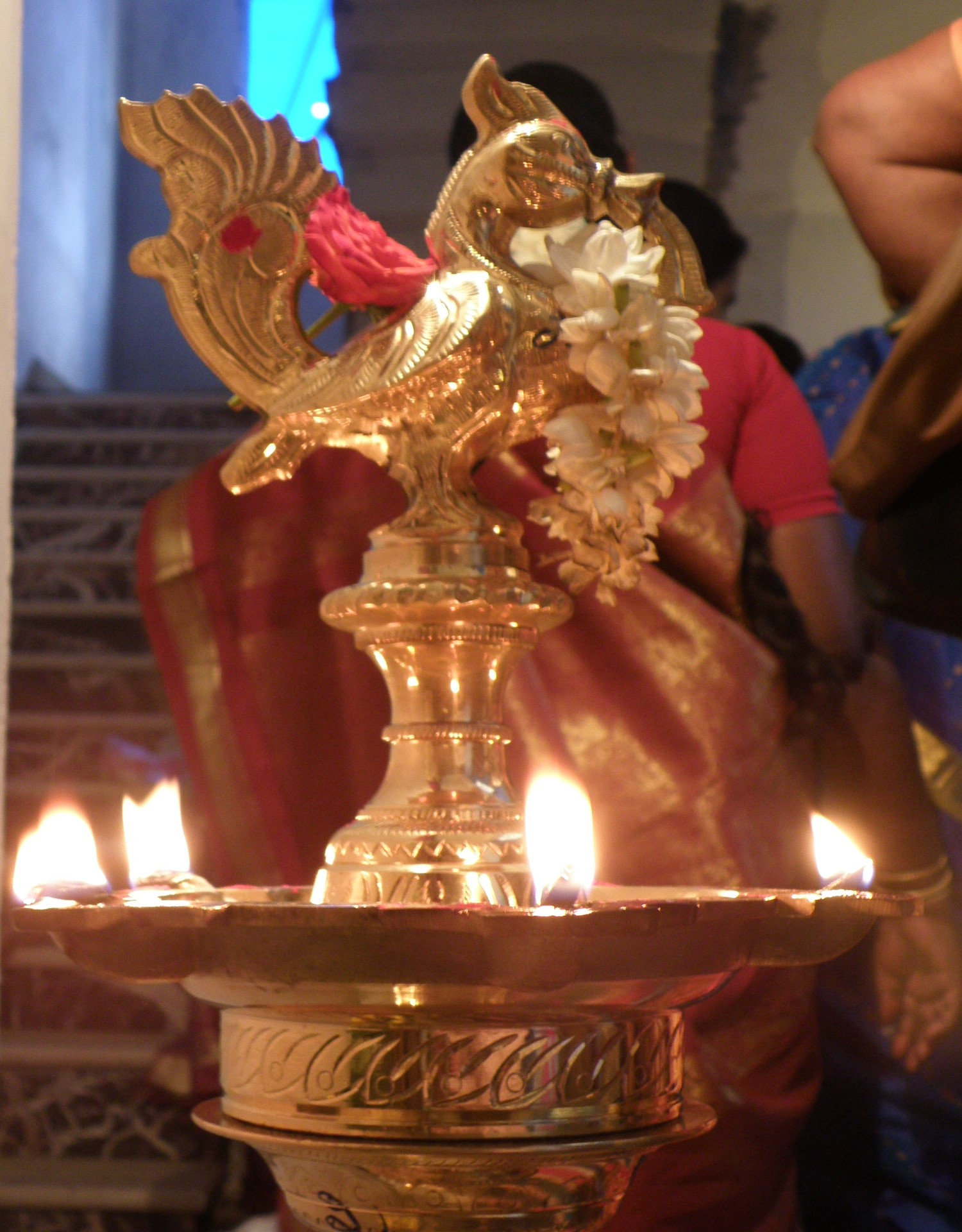 குத்துவிளக்கு